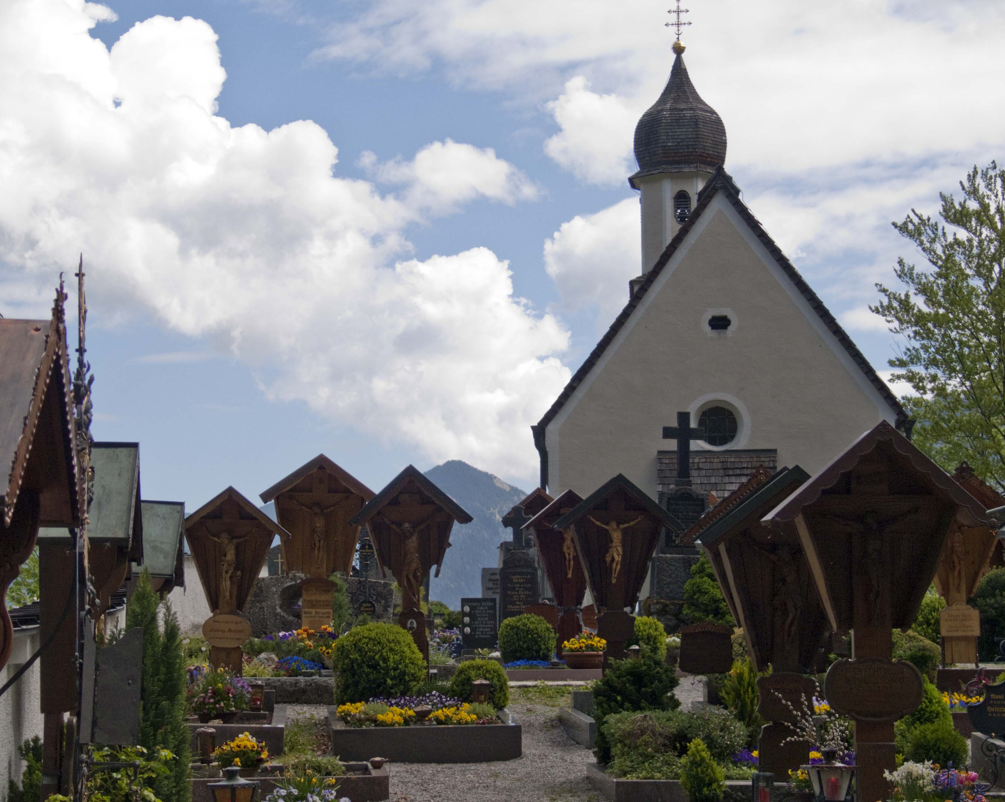 kleiner barocker Saalbau mit Zwiebeldachreiter, spätgotischer Westteil, um 1660 nach Osten verlängert und barockisiert; mit Ausstattung